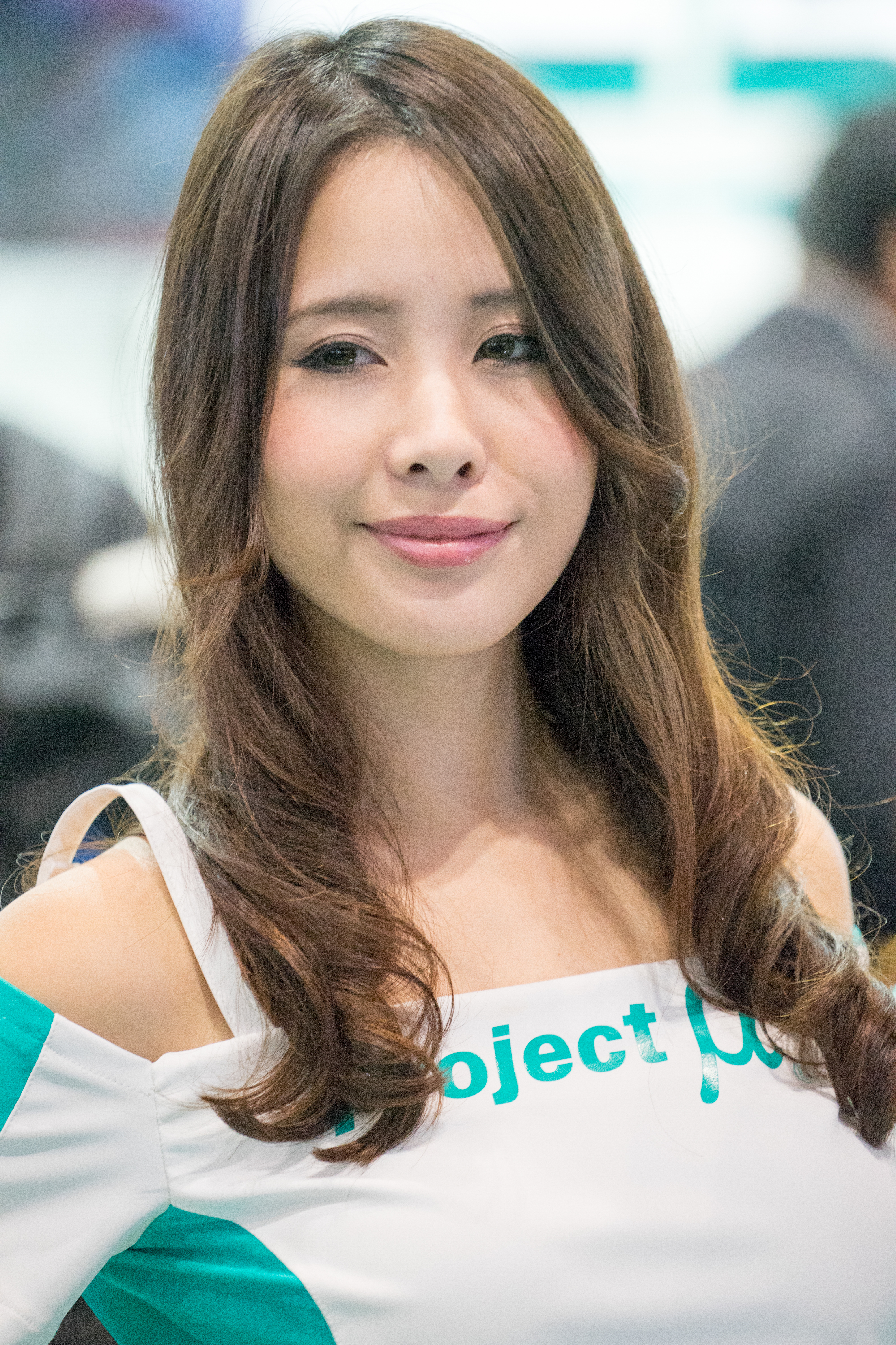 TOKYO AUTO SALON 2017 （東京オートサロン2017）-105.jpg